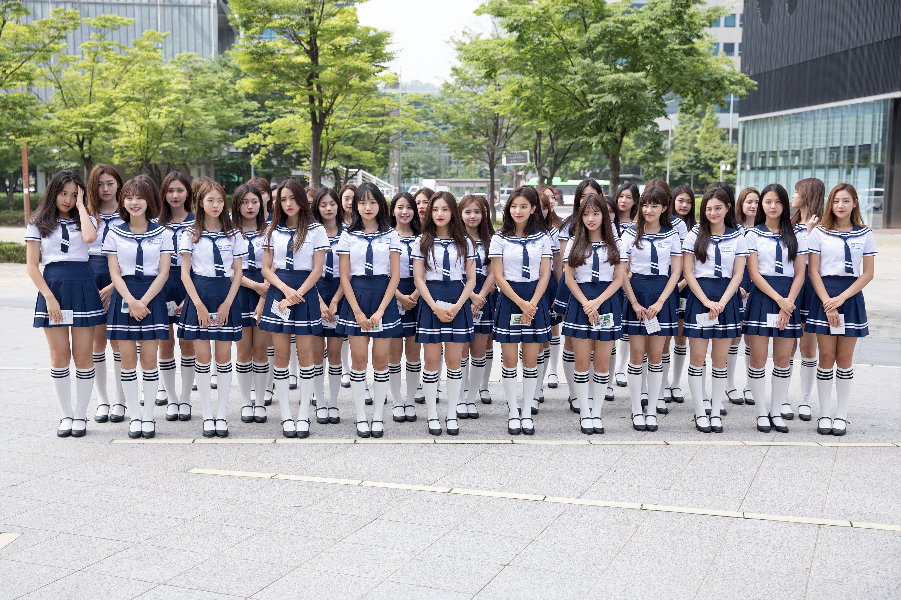 170713 엠카운트다운 아이돌학교